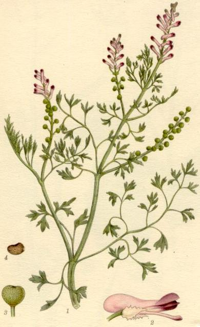 Jordrök (Fumaria officinalis) växtens översta del, blomma (4/1), frukt (5/1), frö (5/1)